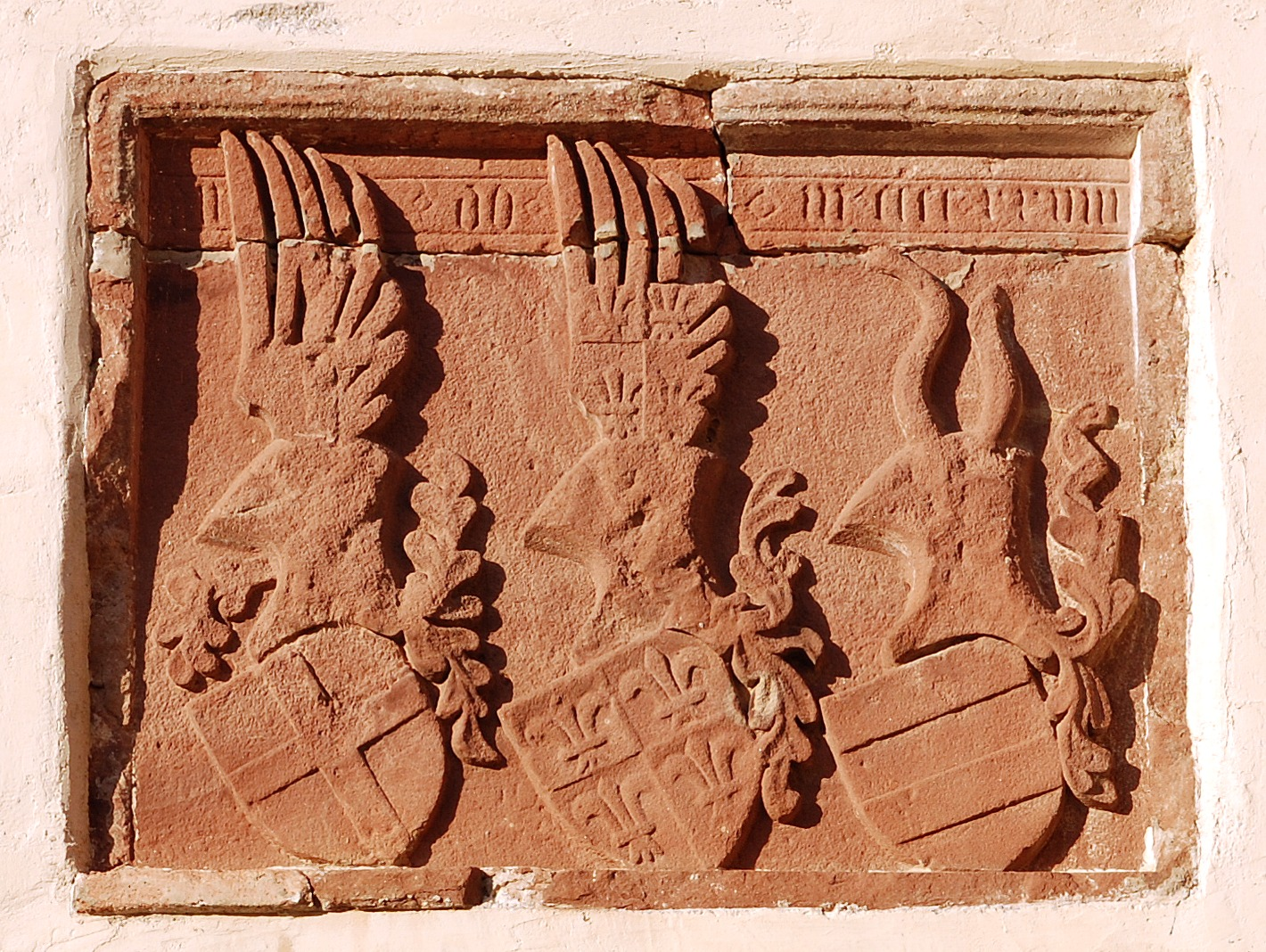 Schloss Beuggen: Wappen über dem Südeingang des Alten Schlosses